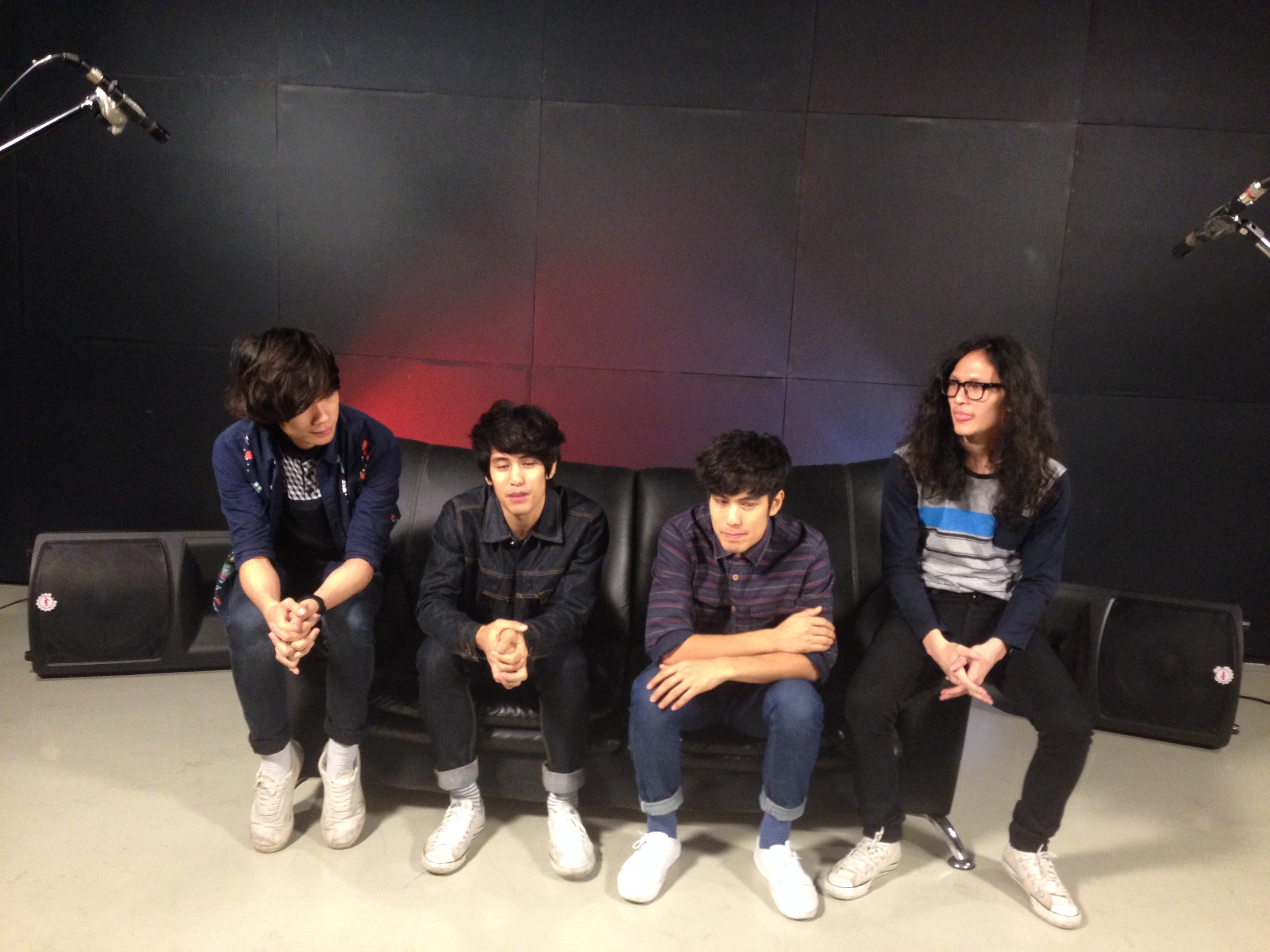 Summer Stop interviewed at VERY TV.